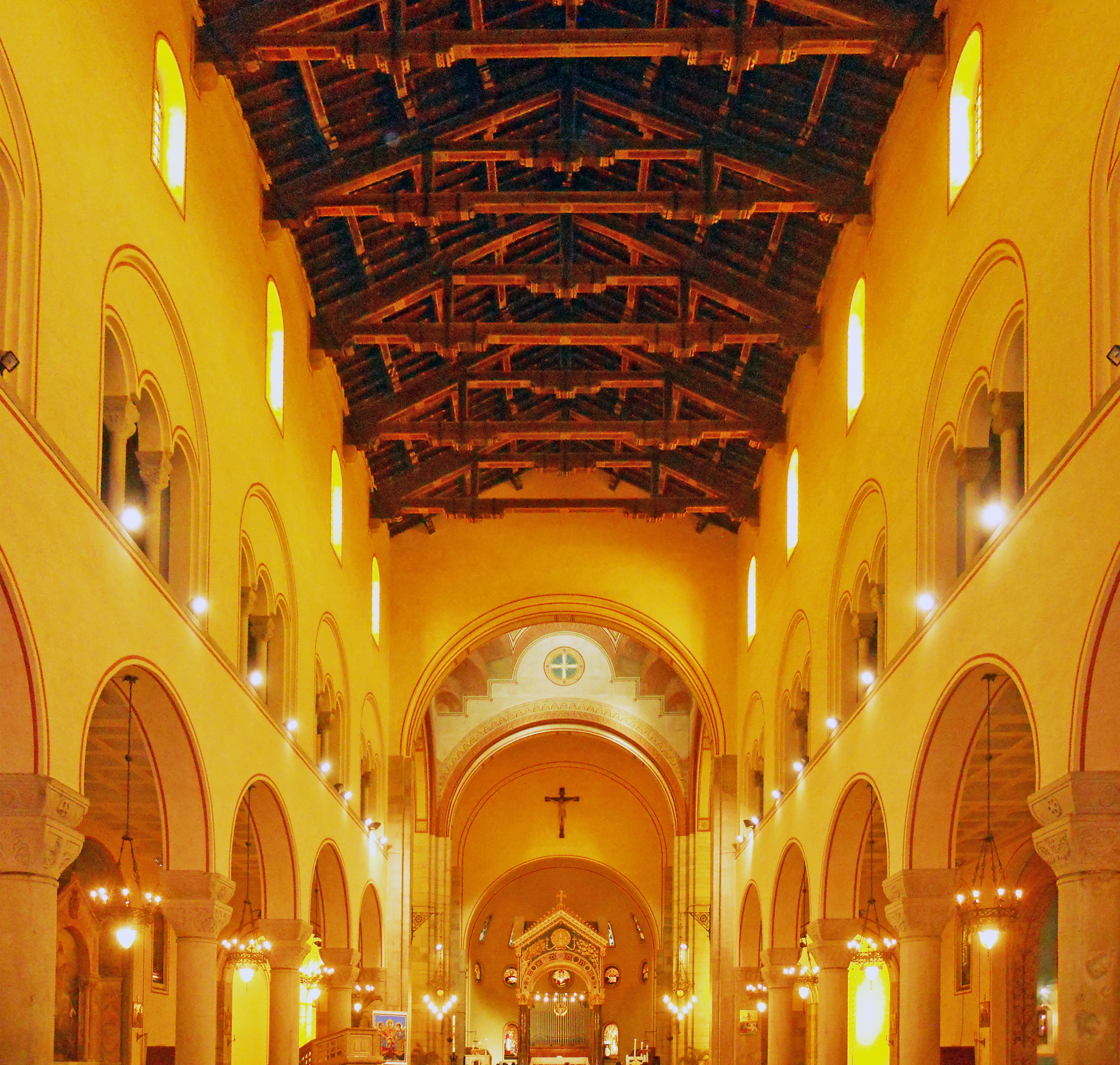 Interno della basilica di Sant'Agostino a Milano